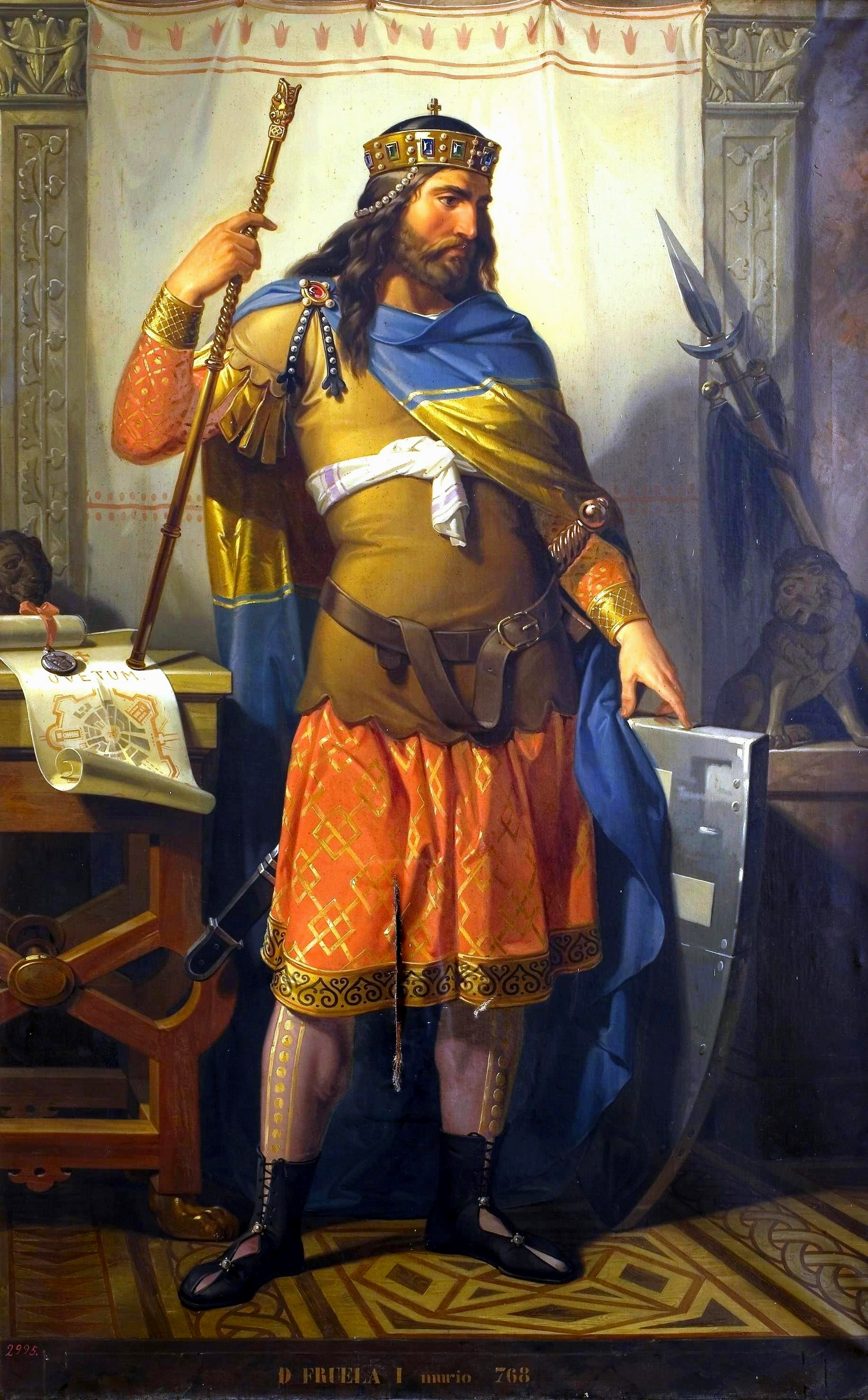 Retrato imaginario del rey Fruela I de Asturias (722-768), que fue hijo de Alfonso I el Católico, a quien sucedió en el trono, y de la reina Ermesinda.